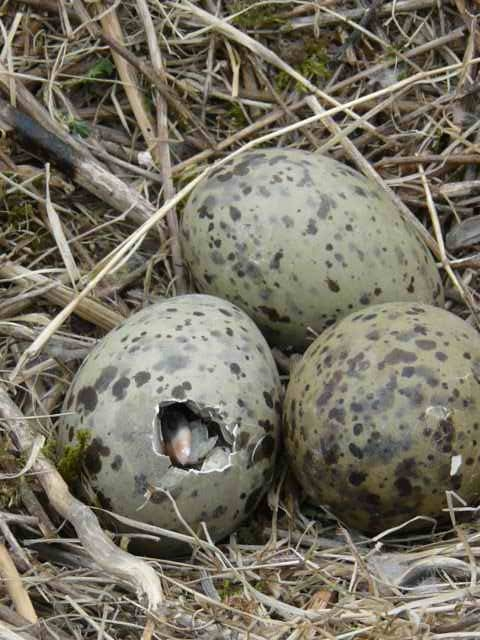 Gelege der Sturmmöwe (Larus canus), erstes Küken schlüpfend